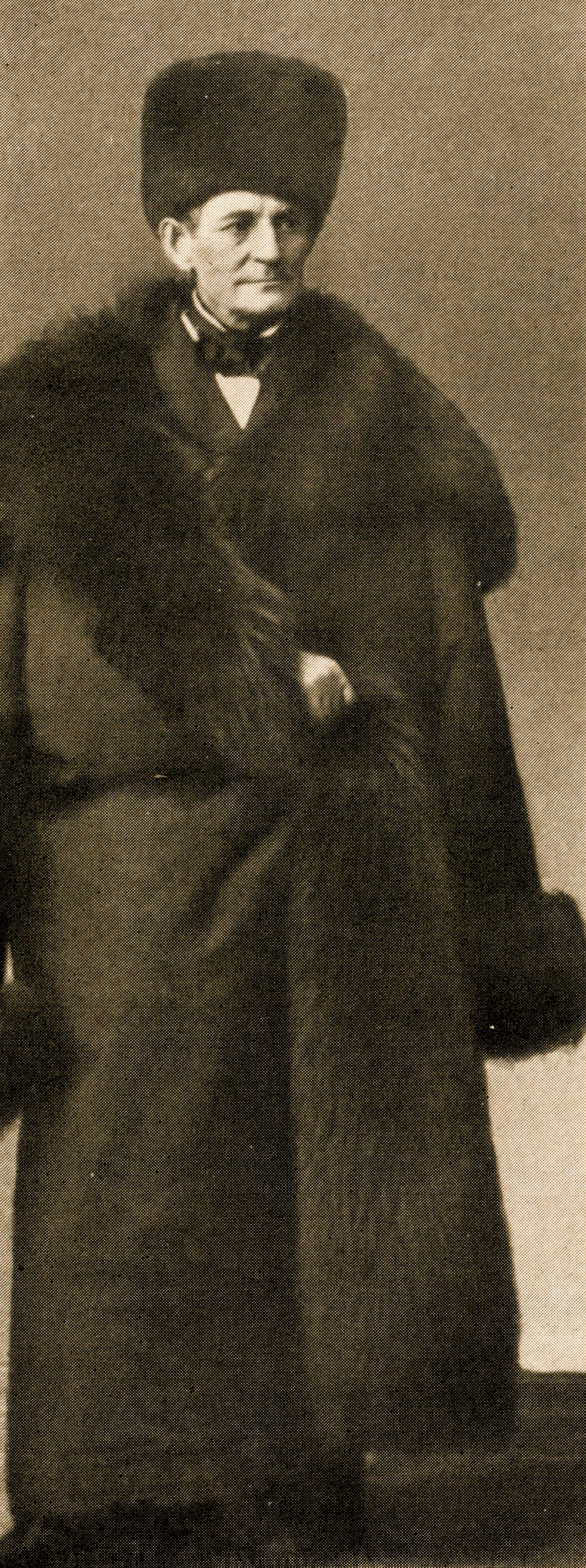 Иван Фёдорович Мамонтов - отец Саввы Мамонтова